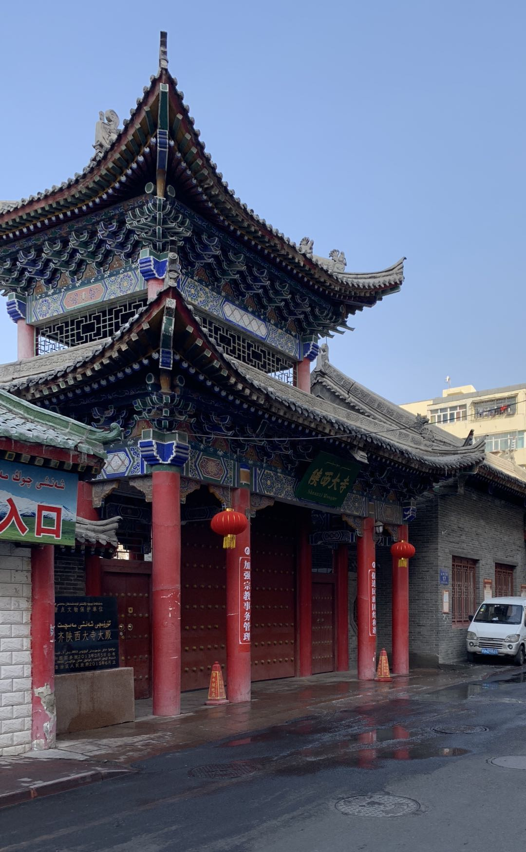 中文（中国大陆）: 乌鲁木齐陕西大寺大门